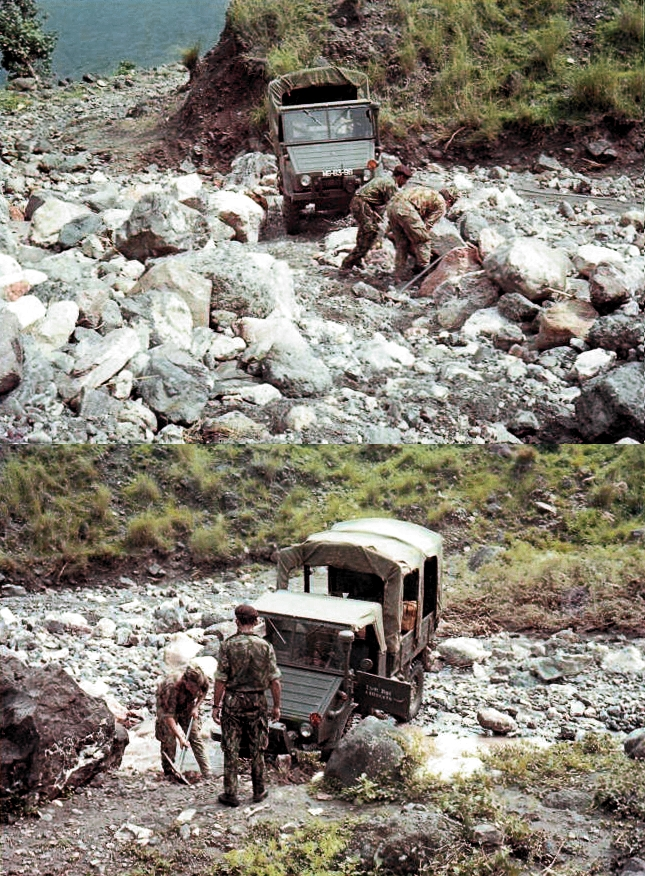 Entre Atsabe e Bobonaro os desmoronamentos e deslizamentos eram muito frequentes:ou a estrada(?!)desaparecia com pedregulhos ou ia aparecer num desnível mais abaixo.Havia sempre que abrir caminho.